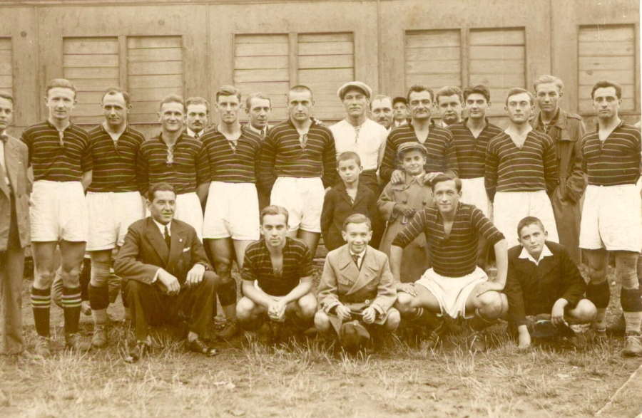 Echipa Ripensia Timisoara